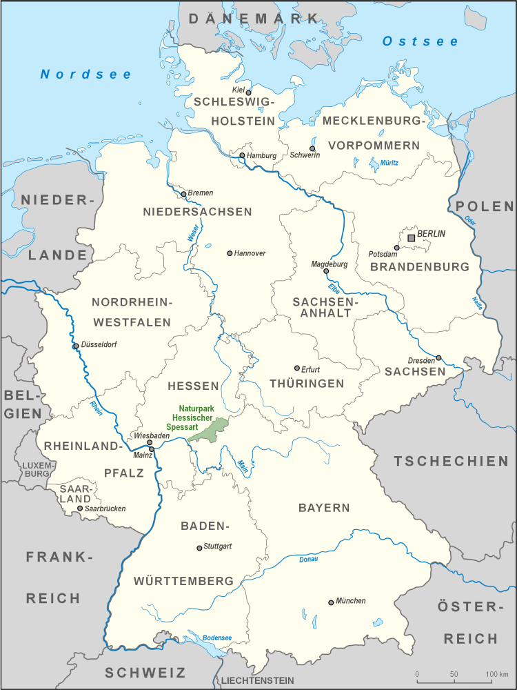 Karte des Naturparks Hessischer Spessart in Deutschland